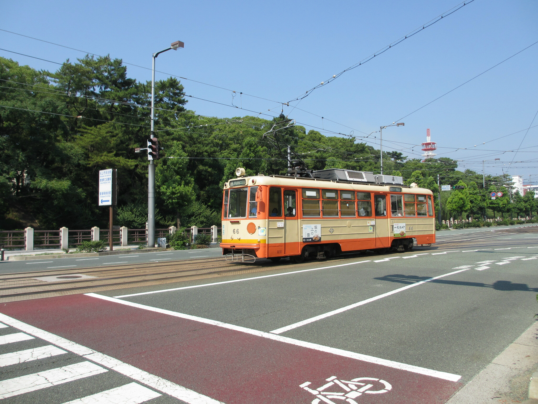 Minamihoribatacho